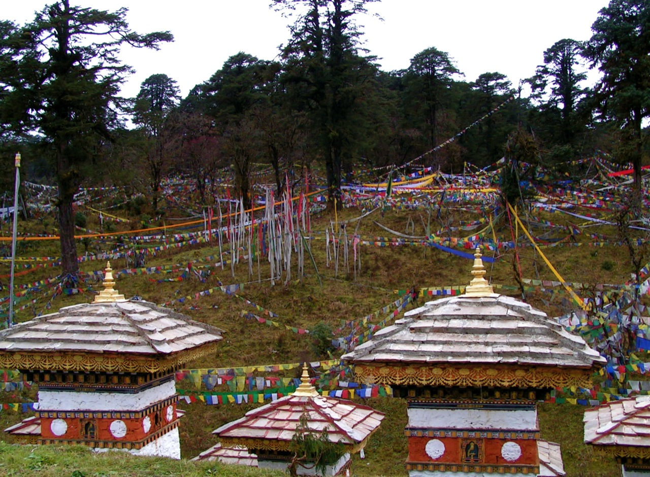 Chorten Dochu-La-Pass, Bhutan